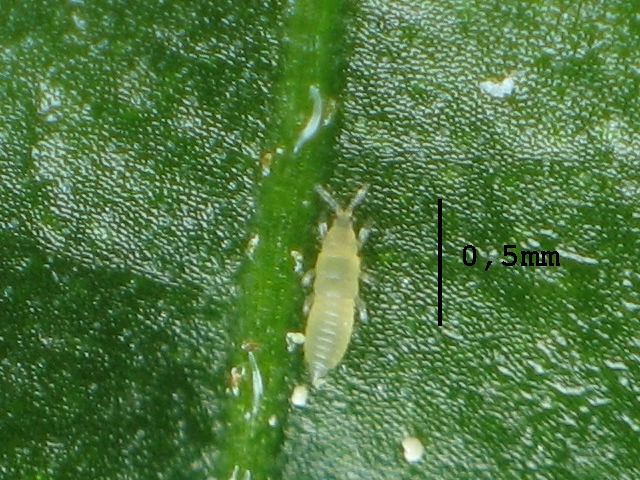 Thrips-Nymphe (Ordnung Thysanoptera), Unterordnung Terebrantia, auf einer Paprikapflanze